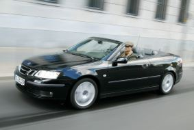 Saab 9-3